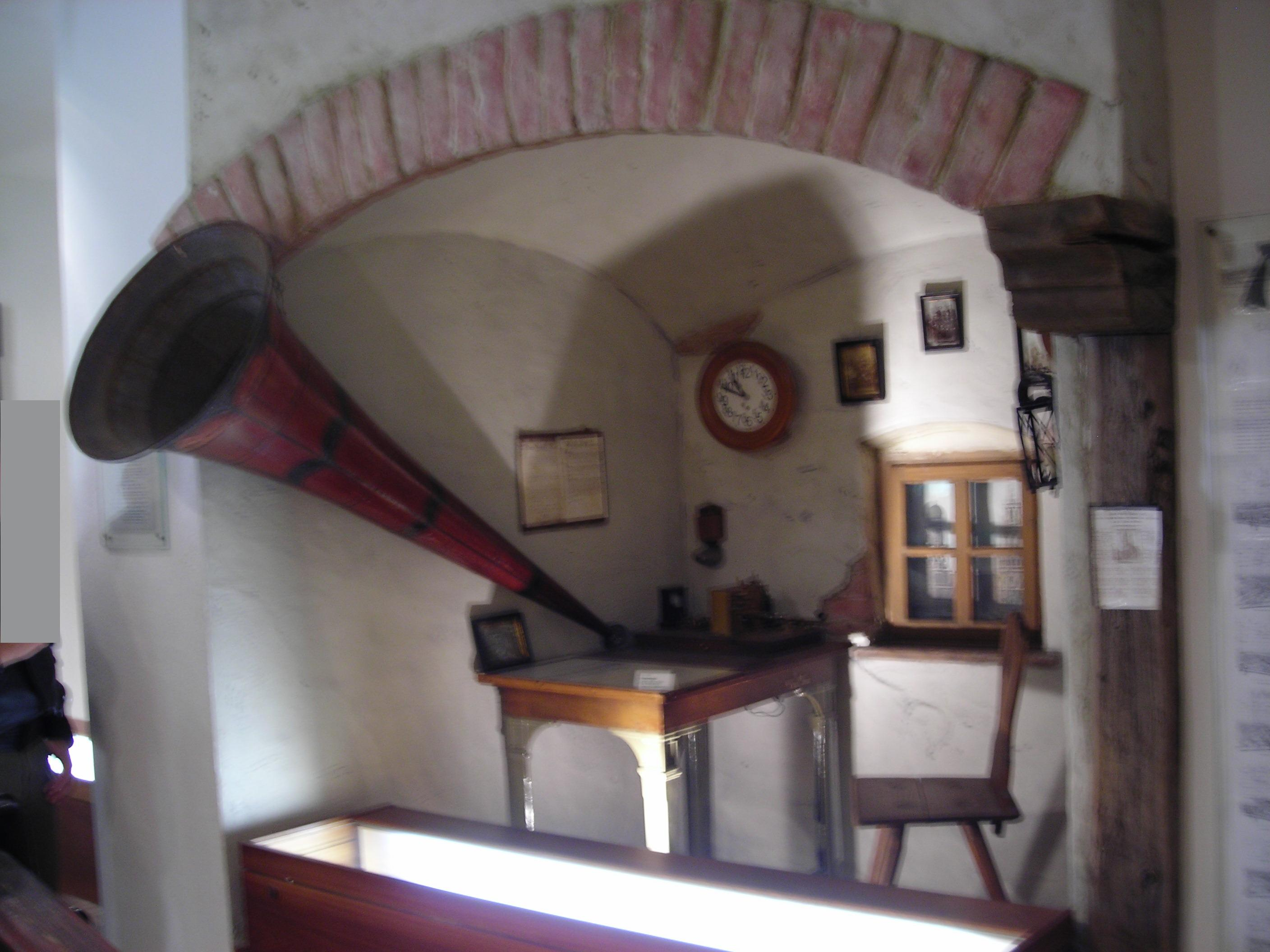 Turmwache im Kirchturm von St. Peter in München wie es sie von 1756 bis zum Anfang des 20. Jahrhunderts (?) gab (es wurde nicht angegeben, welcher Zeit das Turmzimmer entspricht). Der Türmer hielt nach Bränden und Rauchentwicklungen in der Stadt Ausschau und nahm die Alarmierung der Feuerwehren bzw. der Bevölkerung vor. Nachbildung im Feuerwehrmuseum München.